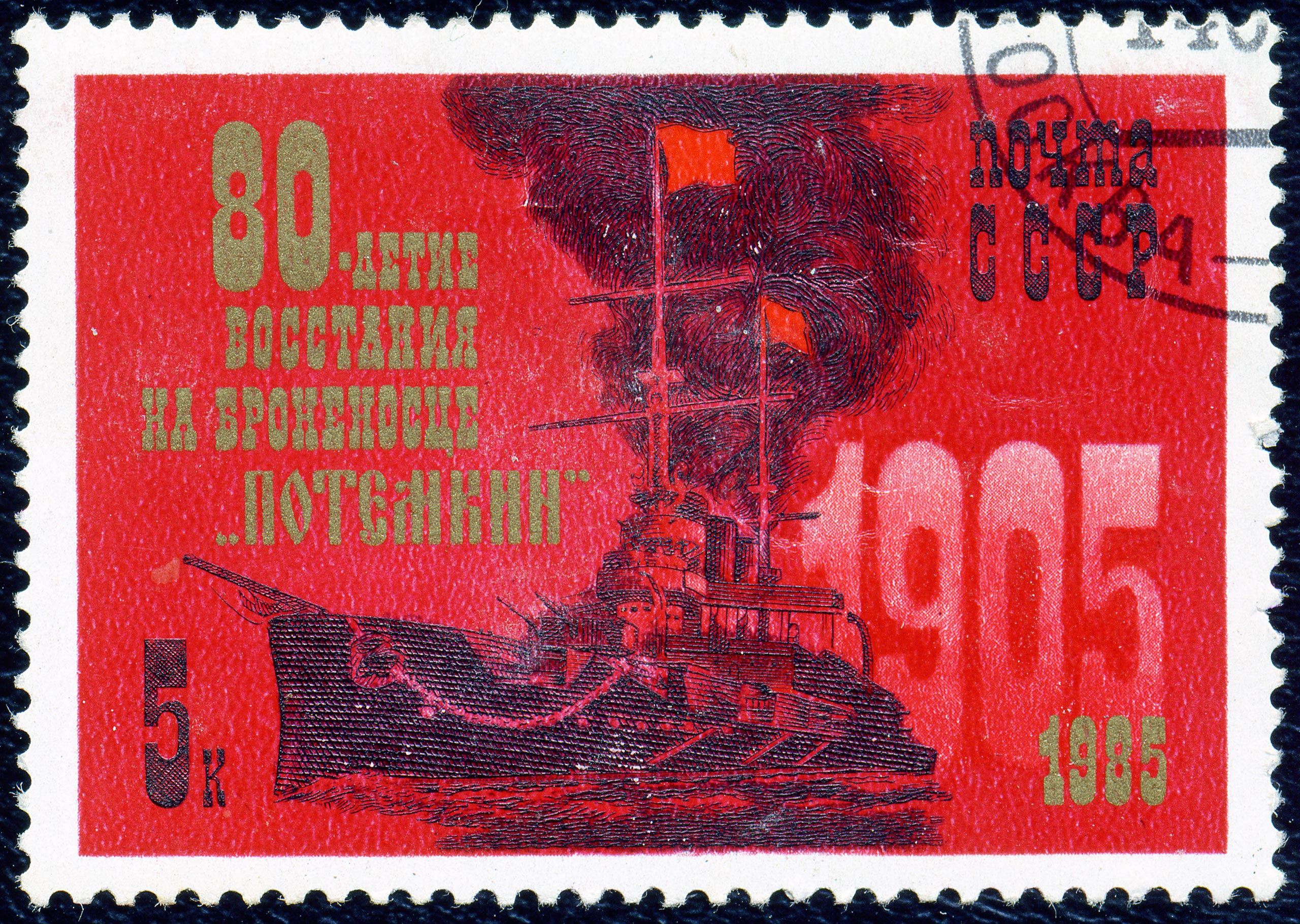 Почтовая марка СССР. 1985. 80-летие восстания на броненосце Потемкин